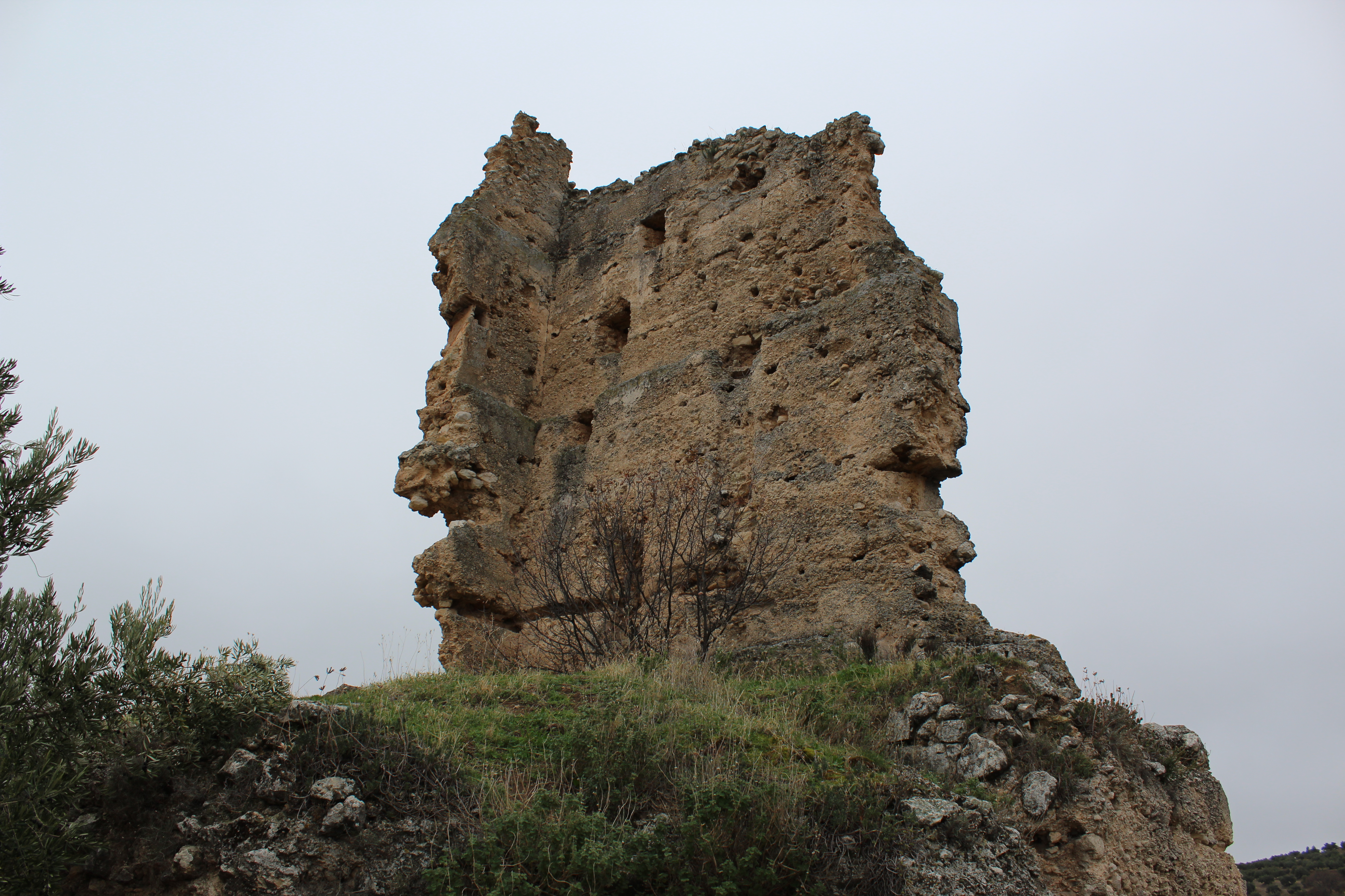 Torre Bermeja, construida en calicanto.